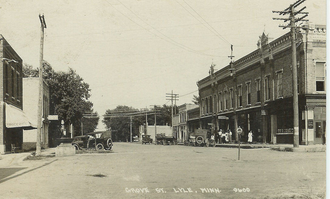 Grove Street in Lyle, Minnesota circa 1921